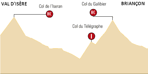 Profile of stage 9 of the 2007 Tour de France - 9e etappe v/d Ronde van Frankrijk 2007